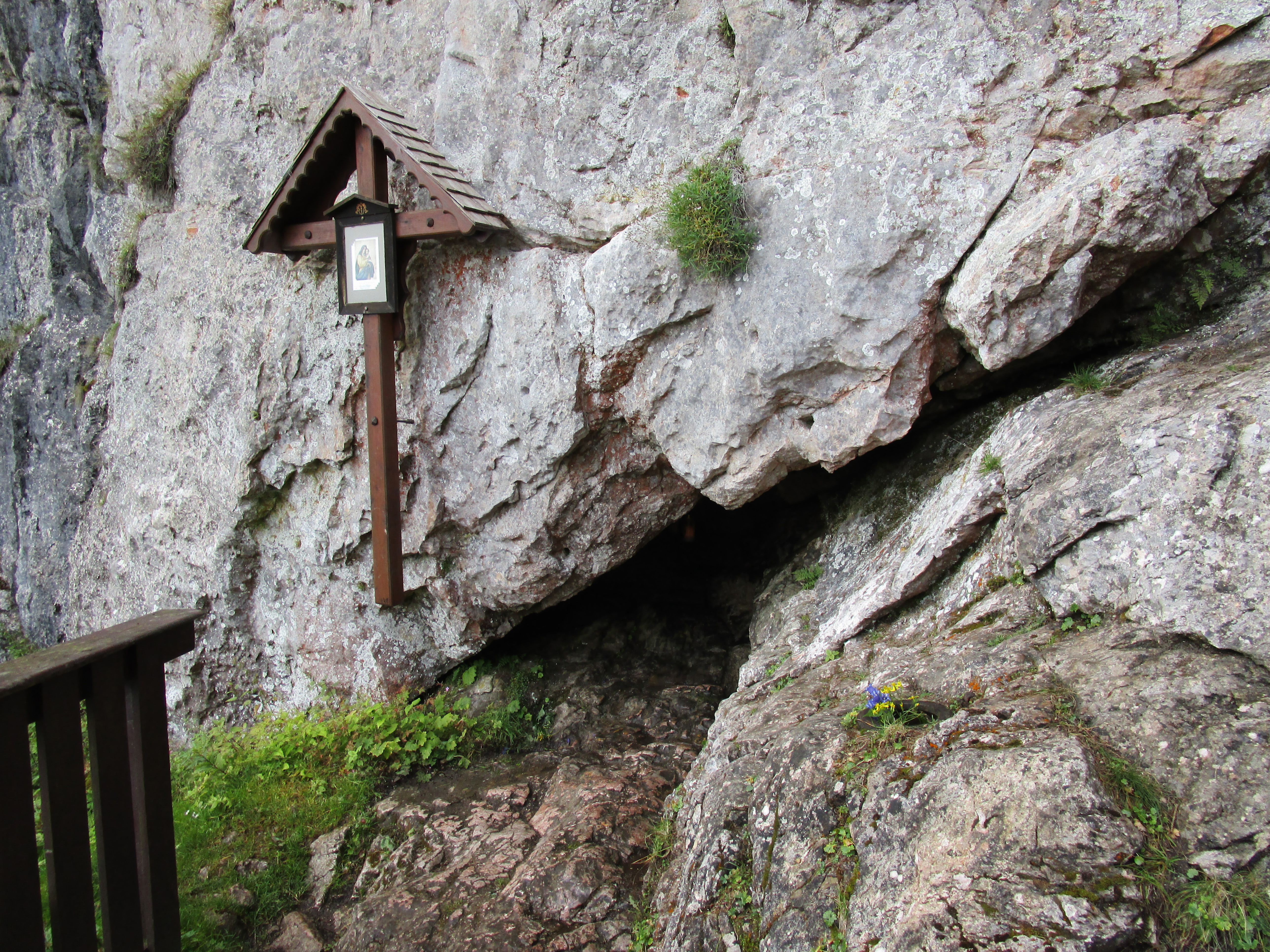 Schüsserlbrunn-Quelle nahe der gleichnamigen Kapelle